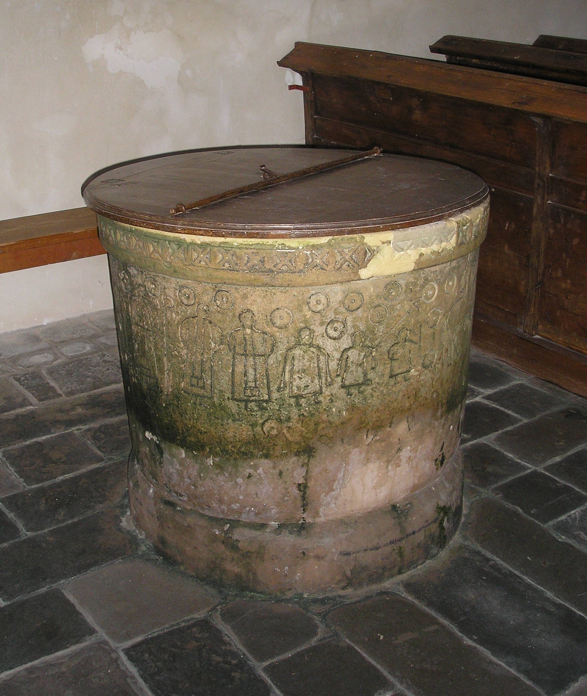 Contrières (Normandie, France). Fonts baptismaux du XIIe siècle de l'église Sainte-Marguerite. Le couvercle est en bois, sur la cuve de pierre calcaire, 14 personnages sont dessinés.